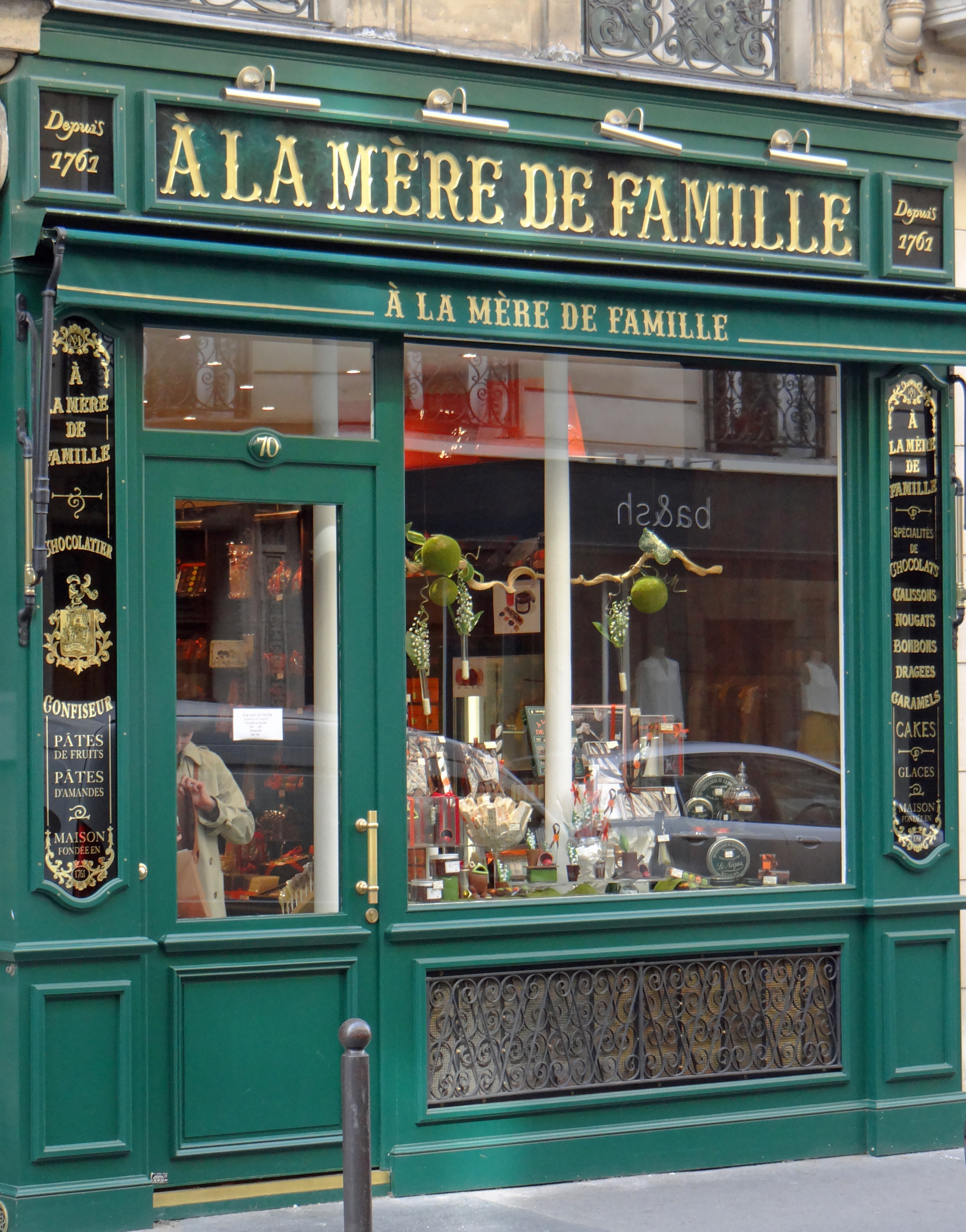 Paris - 70 rue Bonaparte - Devanture magasin